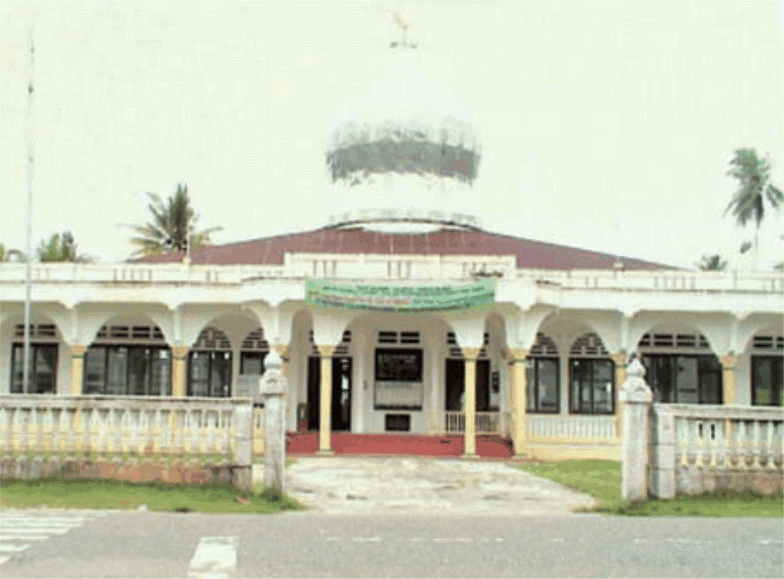 Baiturrahim Singkil